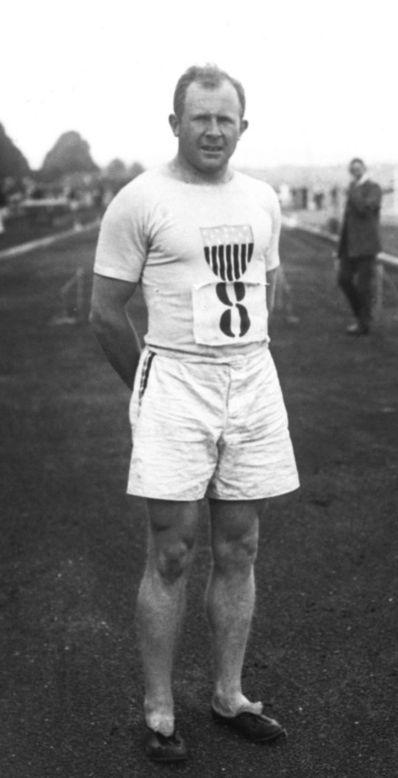 [William] Hamilton, gagnant des 200 m scratch, 1er août 1908 [meeting international d'athlétisme, à Colombes] : [photographie de presse] / [Agence Rol]